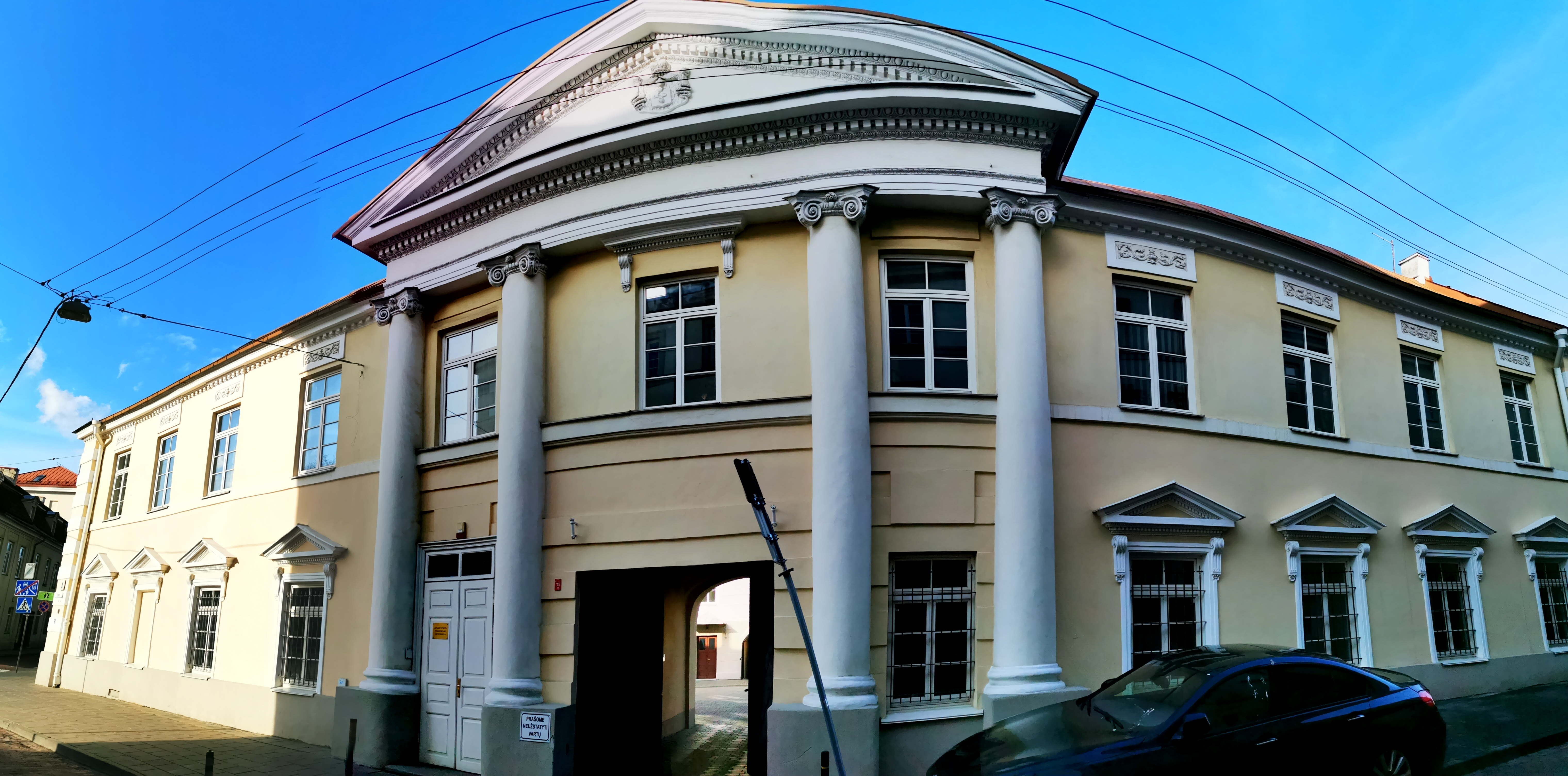 Lopacinskių rūmų (Skapo gatvėje) panorama